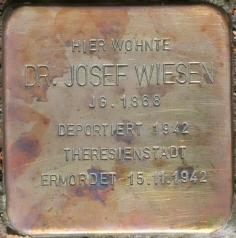 Stolperstein in Eisenach, Schlossberg 10, für Peter Wiesen